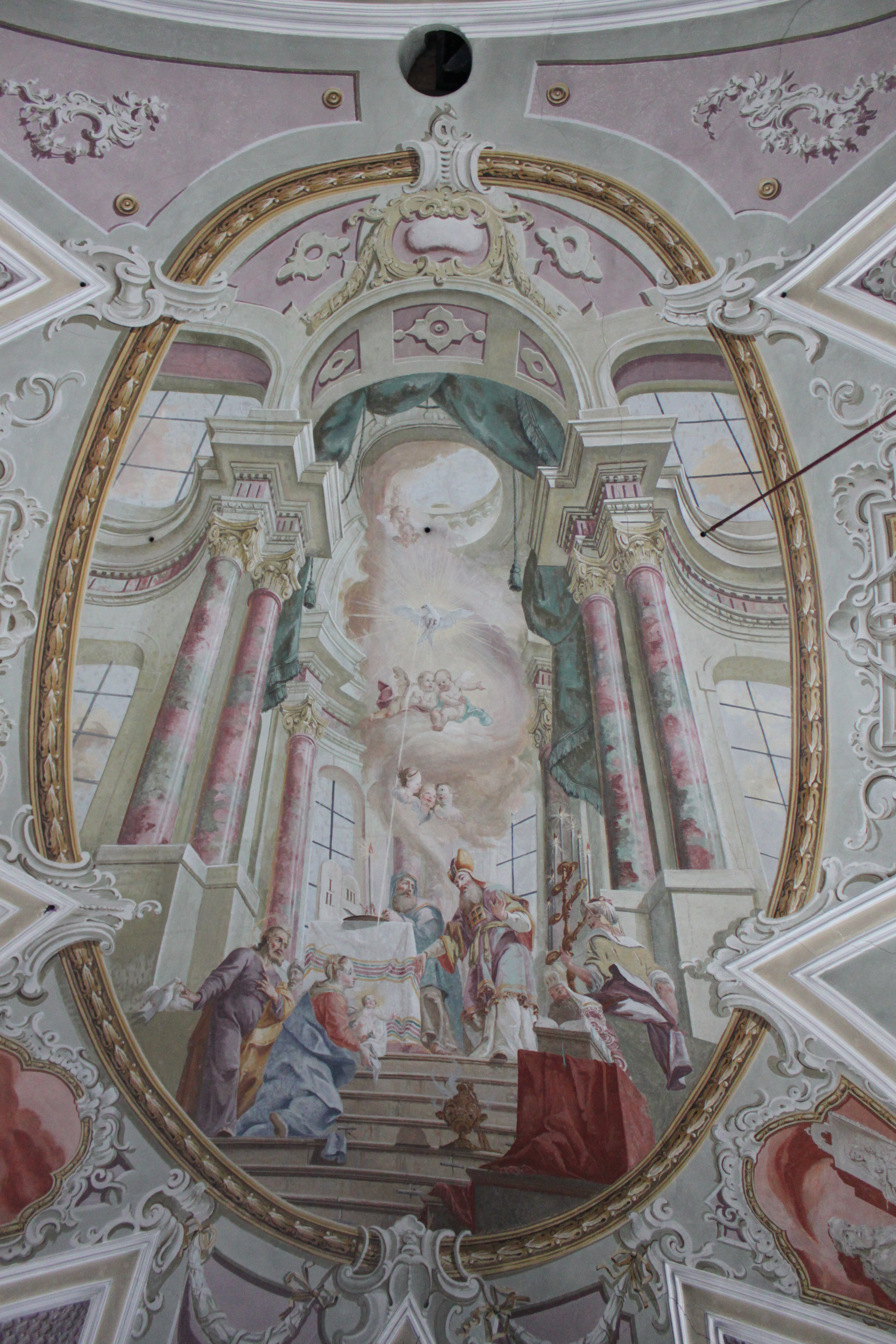 Darbringung im Tempeltitle QS:P1476,de:"Darbringung im Tempel" label QS:Lde,"Darbringung im Tempel"